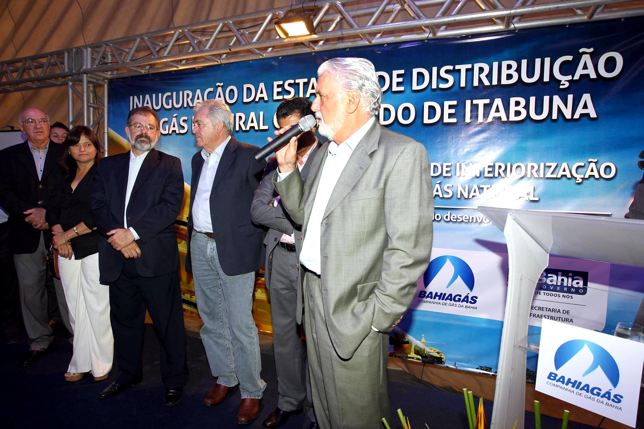 Governador Jaques Wagner inaugura a Estação de Distribuição de Gás Natural (Bahiagás) no município de Itabuna. Foto: Manu Dias/SECOM